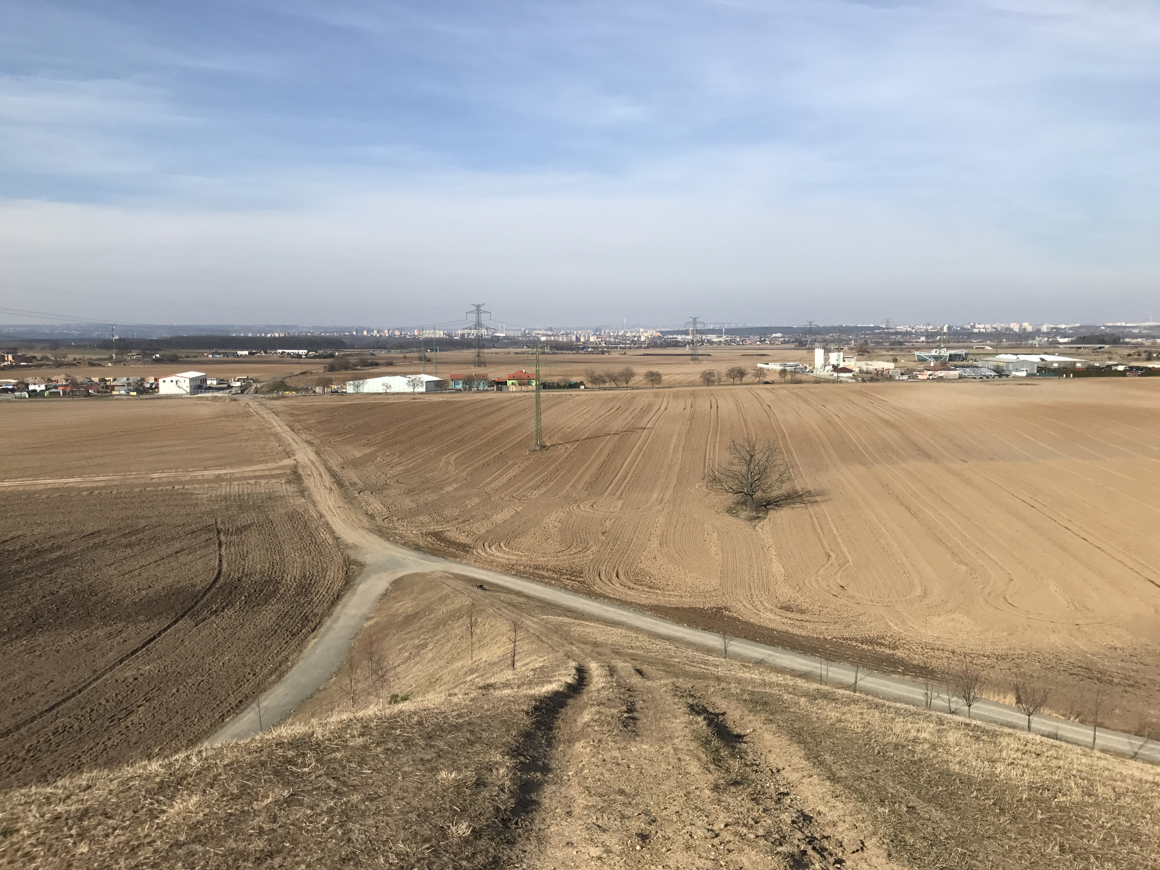 Kopec Kamínek, Zlatníky-Hodkovice (Dolní Břežany), okres Praha-západ – pohled z kopce Kamínek